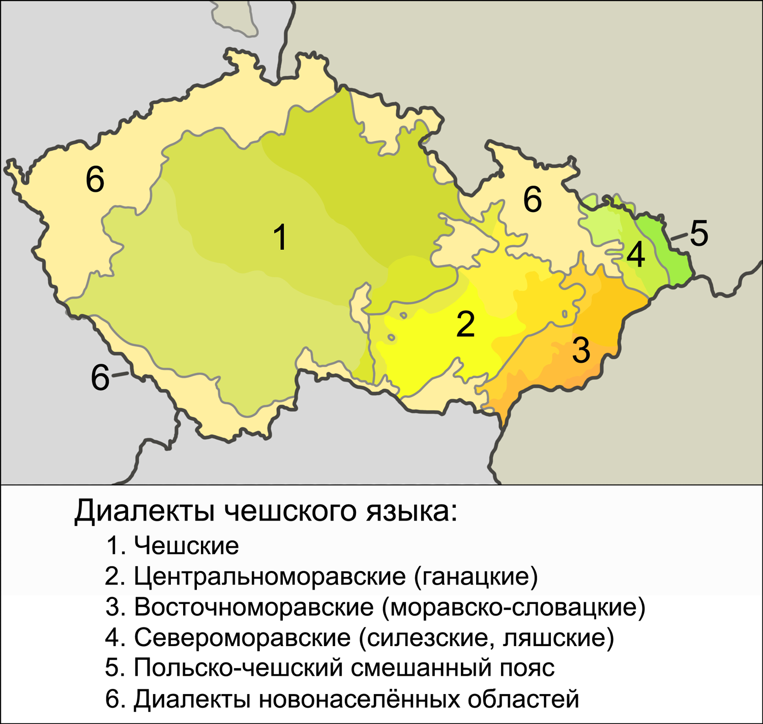 Карта диалектов чешского языка. Источники: Short D. Czech // The Slavonic Languages / Edited by Comrie B., Corbett G. — London, New York: Routledge, 1993. P. 528. — ISBN 0-415-04755-2 — Map 9.1 The main Czech dialect divisions Bělič J. Nástin české dialektologie. — Praha: 1972 Čeština po síti. Útvary českého národního jazyka (Pavlína Kuldanová)